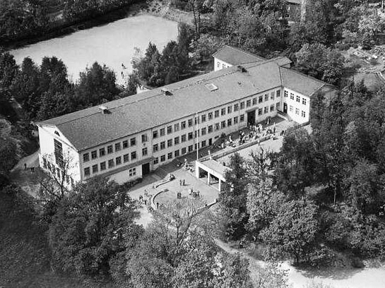 Ullern videregående skole (tidl. gymnas). Noreveien, Montebelloveien. (Flyfoto).